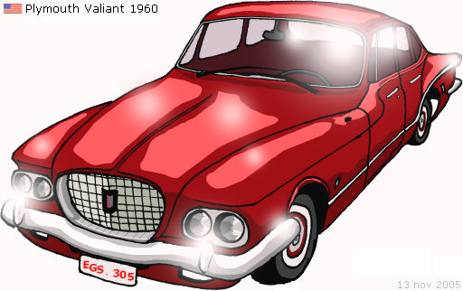 Zelf gemaakt; 13 nov 2005